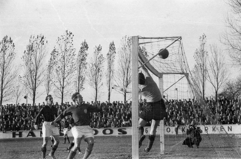 im Holsteinstadion.